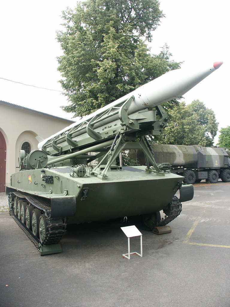 Bundeswehrmuseum Dresden mit Teilen von der NVA Remark: Luna / FROG-3/4/5 missile.